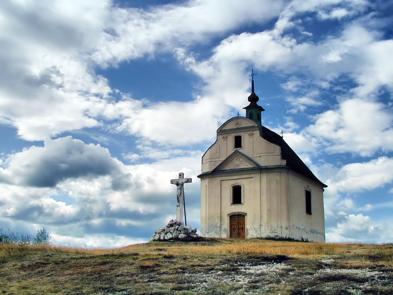 Spišské Podhradie, Prešovsky (Slovaquie) - Chapelle baroque et croix (1675) au sommet d'une colline de travertin